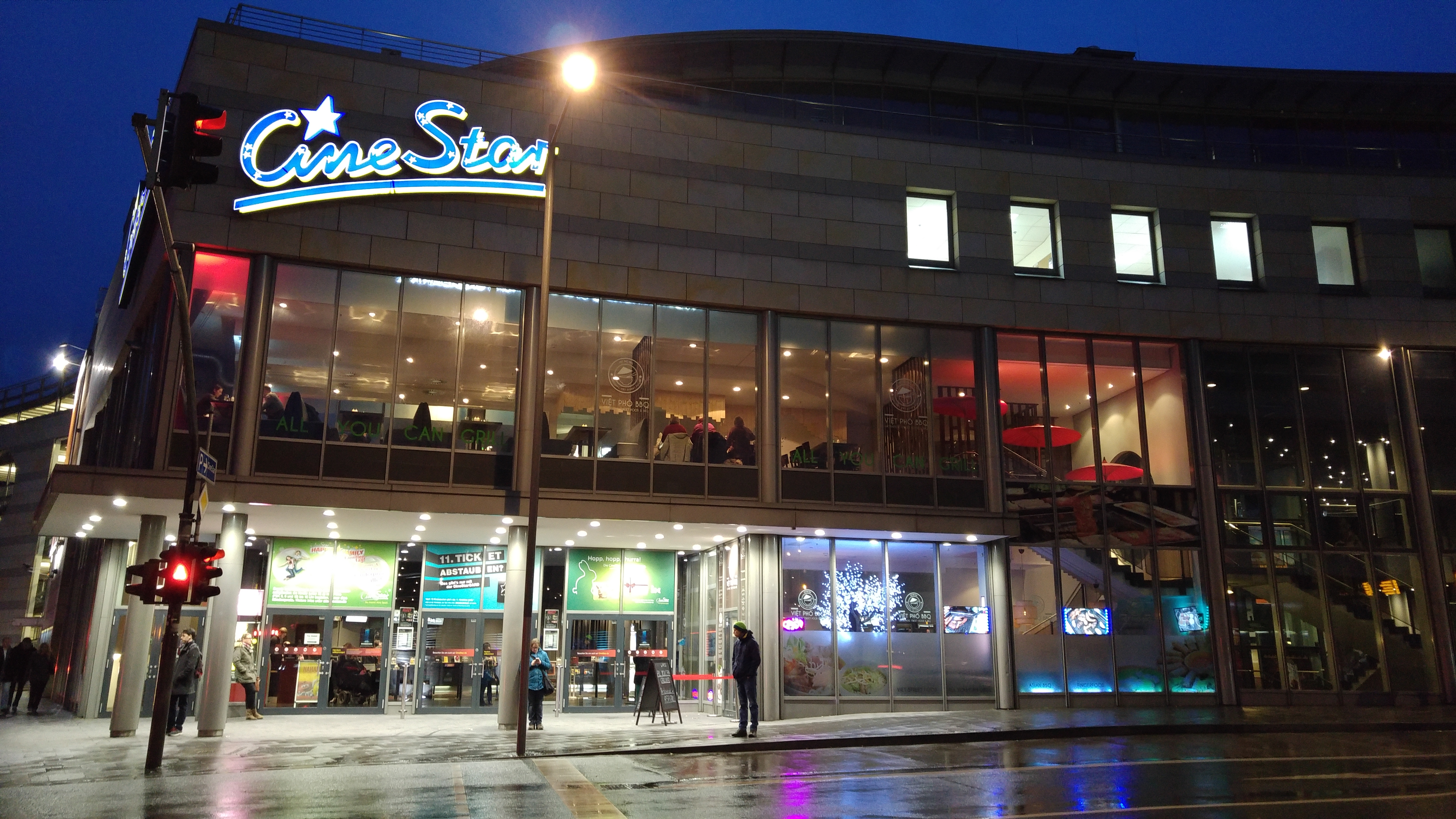 Cine Star Mainz